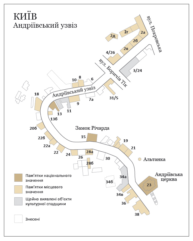 Схема Андріївського узвозу (Київ, Україна): Кольором позначені пам'ятки національного значення, місцевого значення і щойно виявлені об’єкти культурної спадщини станом на 1 січня 2012 року (не позначені пам'ятки археології).